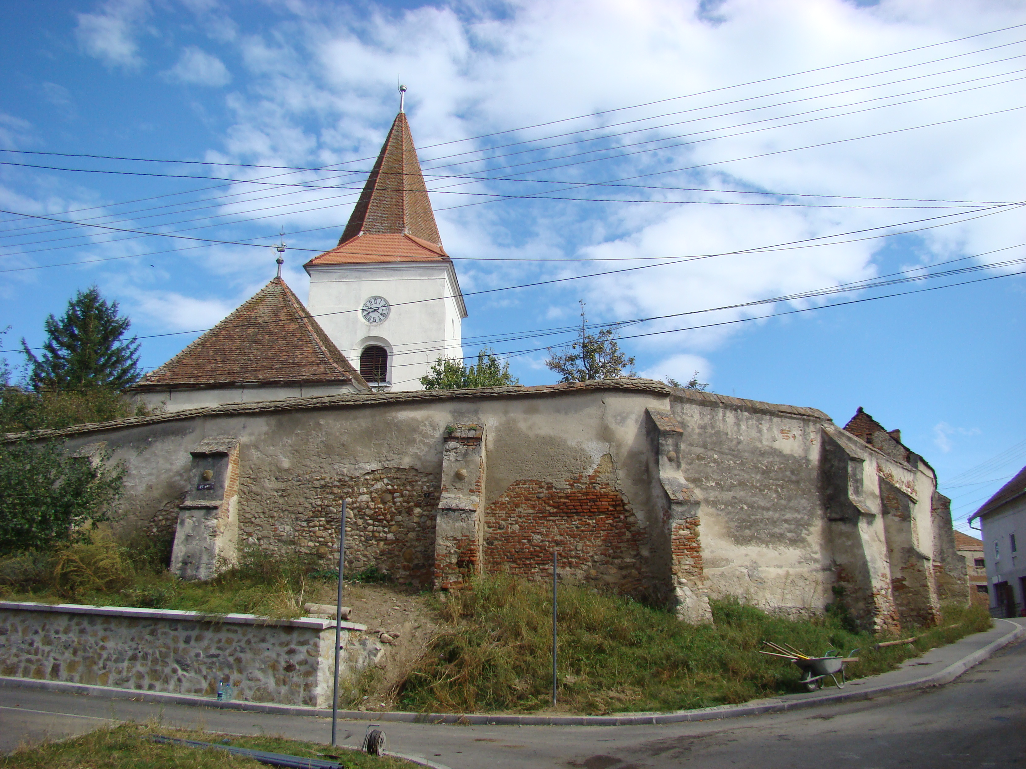 Biserica reformată din Ocna Sibiului